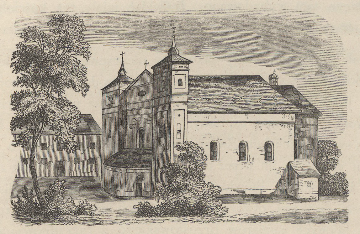 Беларуская (тарашкевіца): Міхалішкі (Michališki), вуліца Сьвіранская (vulica Śviranskaja). Касьцёл Сьвятога Міхала Арханёла і кляштар аўгустынаў